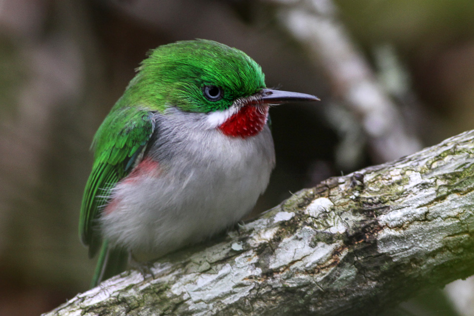 Sierra Baerucu National Park Upper reaches